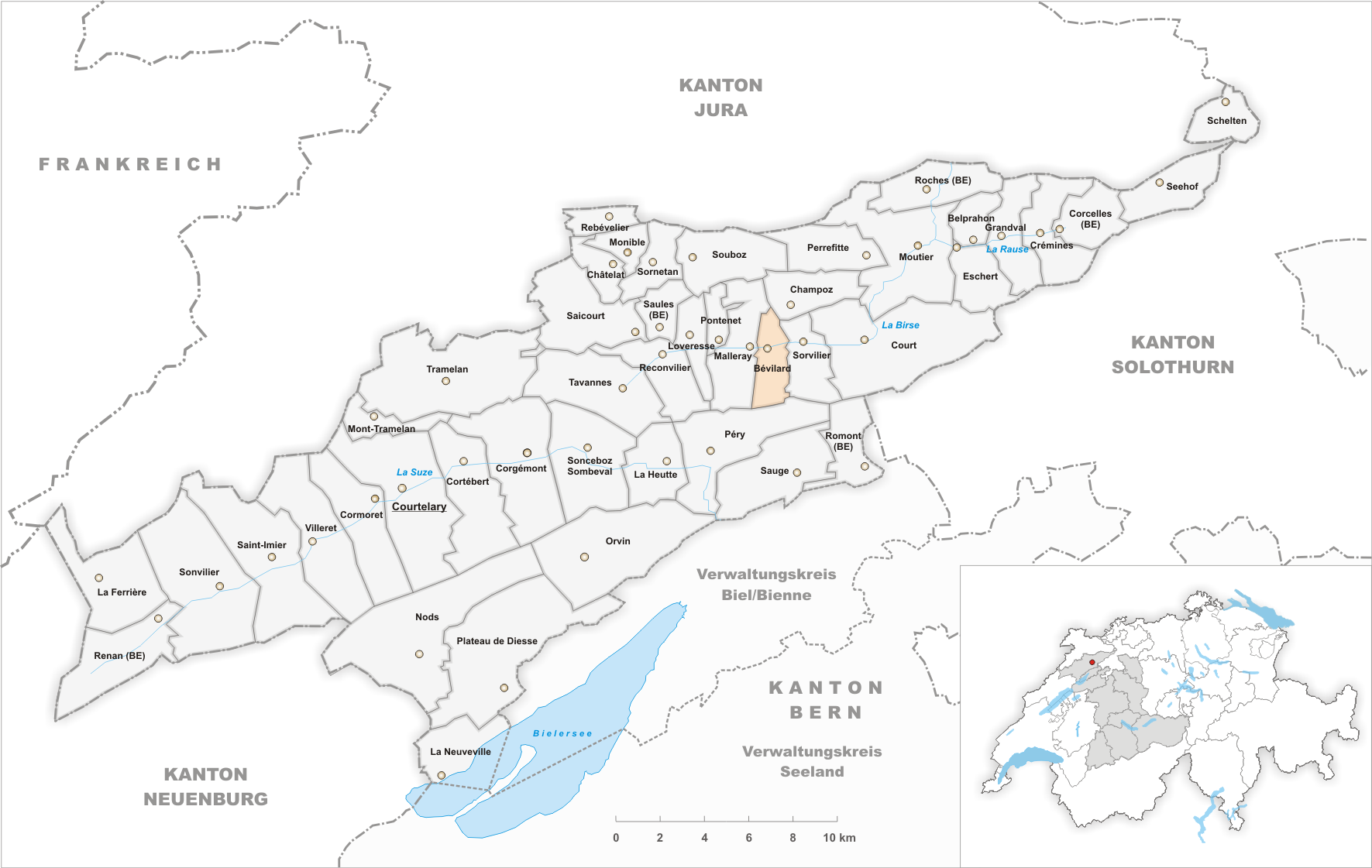 Municipality Bévilard